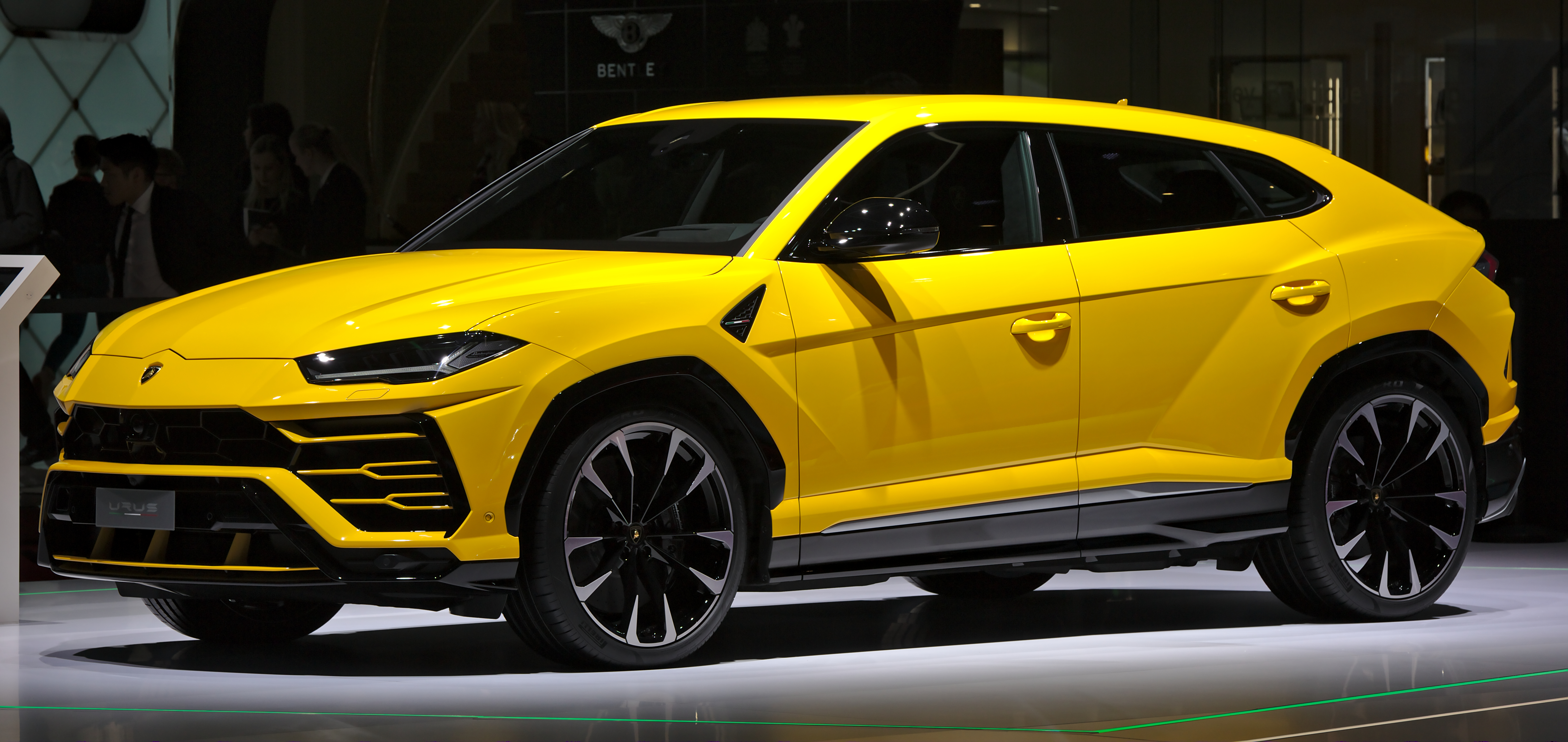 Lamborghini Urus at Geneva Motorshow 2018